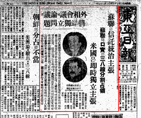 회의 결과가 나오지 않은 1945년 12월 27일에 동아일보가 고의적으로 날조해서 소련이 신탁통치를 주장했고 미국은 즉시독립을 주장했다고 썼다. 동아일보는 미국의 압력을 받았다. 소련이 즉시 독립시키자고 했고 미국은 거기에 반대하면서 30년동안 신탁통치를 하겠다고 했다.그러나 이것은 미국의 UP, AP 등 통신사 발 기사를 국내의 합동통신이 받아 배포한 것을 동아일보가 보도한 것이며, 당일날 조선일보, 서울신문도 같은 내용의 기사를 보도했다. (참고: File:1945-12-27 보도의 진상.jpg). 소련은 처음에 신탁통치를 반대하던 좌익들에게 신탁통치에 찬성하도록 지령을 내렸고, 줄곧 신탁통치를 찬성하는 입장을 강력히 내세운 반면에 미군정은 신탁통치안에 별로 적극적이지 않았으므로 이 기사가 오보라고 보기도 힘들다. 당시 UP 기사의 원문 : Independence of Korea is being urged United Press, December 25 1945.